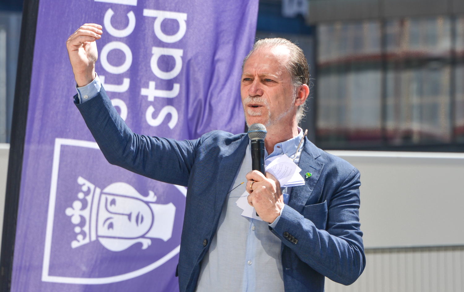 Stockholms trafikborgarråd Daniel Helldén (MP) nyinviger Sergels torg med bredare gåytor och cykelbanor efter 6 års renoveringar av ytskikten. Den 25 juni 2018.